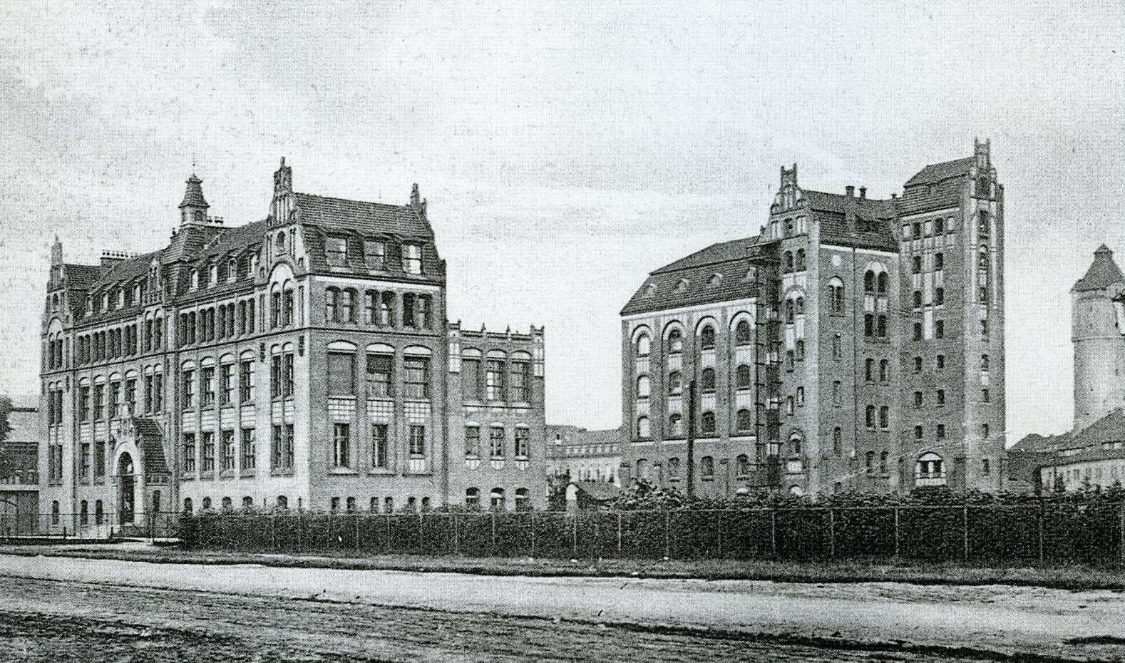 Durch Vereinigung der Versuchsanstalt des Verbandes deutscher Müller und des Staatlichen Versuchskornhauses entstand 1907 in der Seestraße 11 die Versuchsanstalt für Getreideverarbeitung Berlin. Auf dem Gelände befanden sich eine Mühle, eine Bäckerei und ein Hauprgebäude. Letzteres wurde im Juni 2008 abgerissen, um einem Neubau für das Robert Koch-Institut Platz zu machen. Die Aufnahme entstand um 1910.